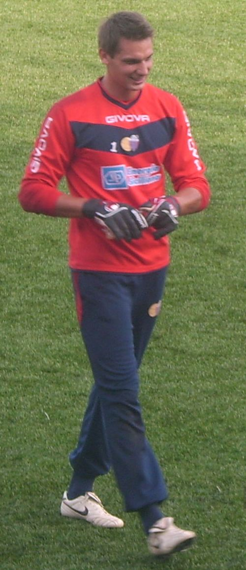 Tomáš Košický al centro sportivo Torre del Grifo Village